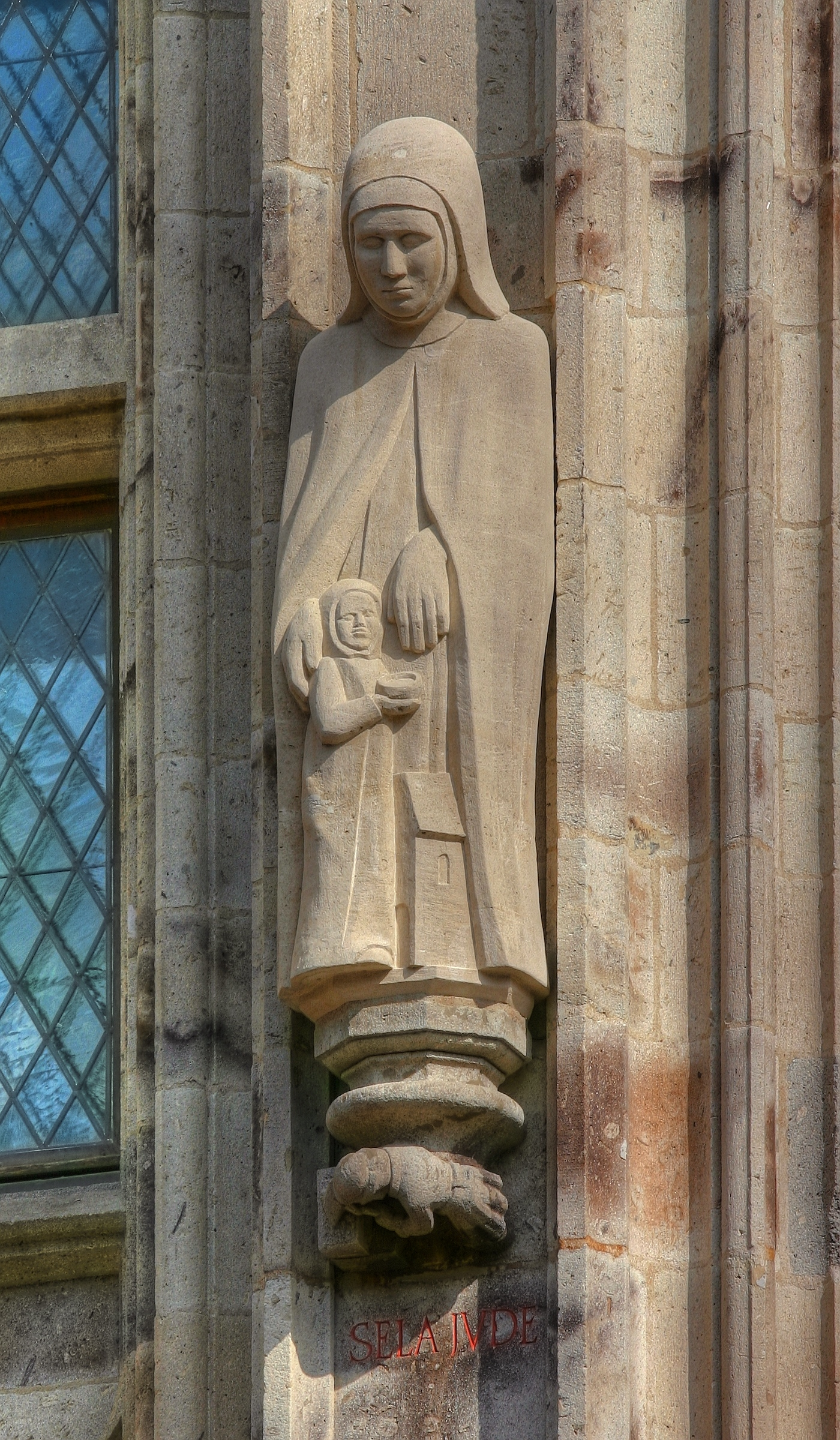 Rathausturm Köln mit der Figur der Sela Jude (Begründerin des ersten Beginenkonvents in Deutschland)